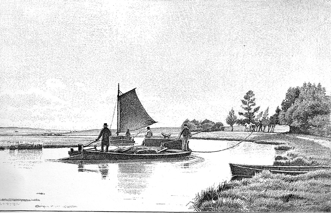 Pramme på Gudenåen - stik efter Hans Smidths maleri